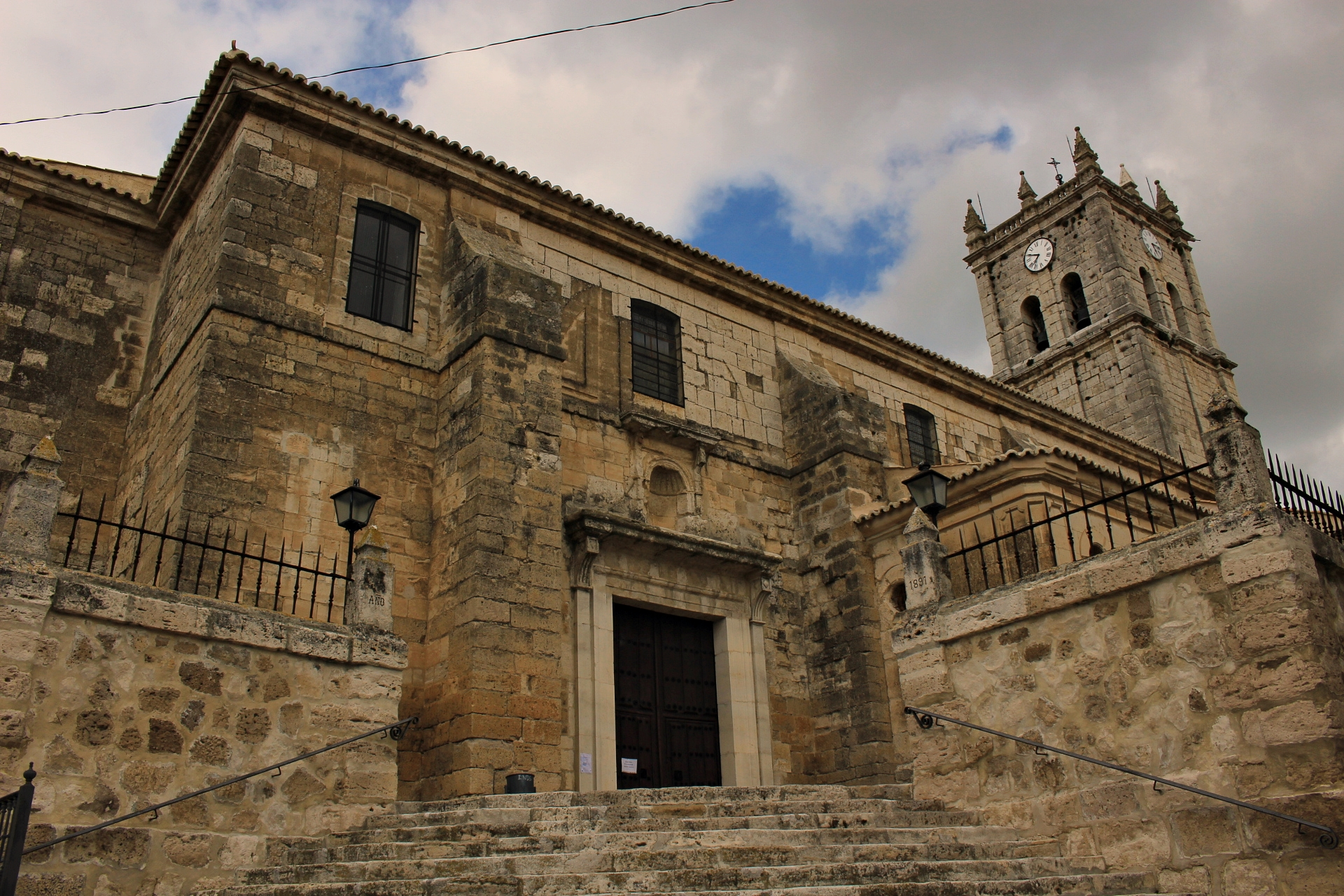 San millán